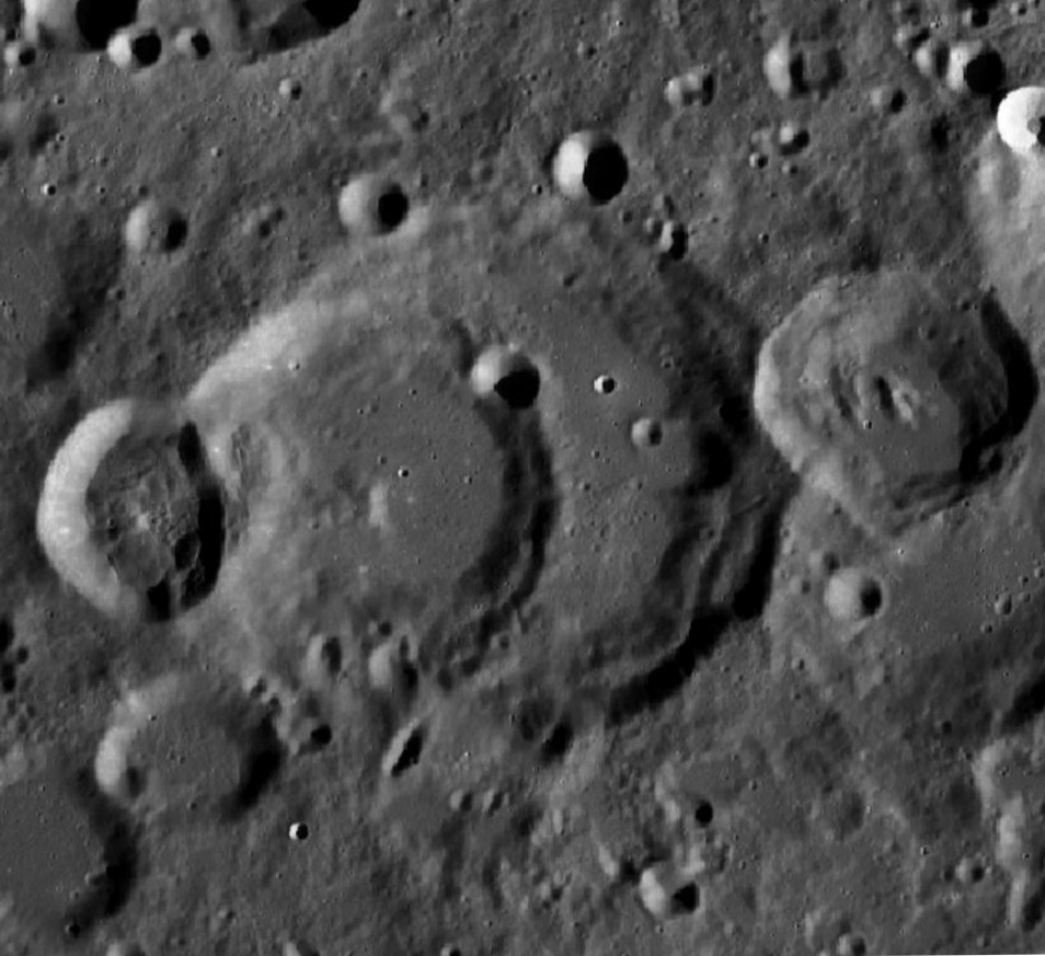 Cráter lunar Perrine. (Imagen LRO)